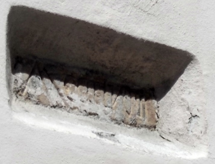 La formella nella parete est della chiesa